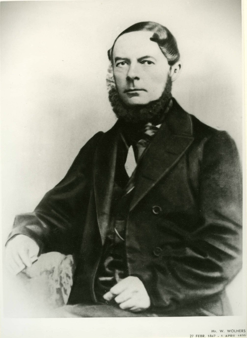 Portret van Wolther Wolthers, burgemeester van Marum, Kloosterburen, Leens en Ulrum